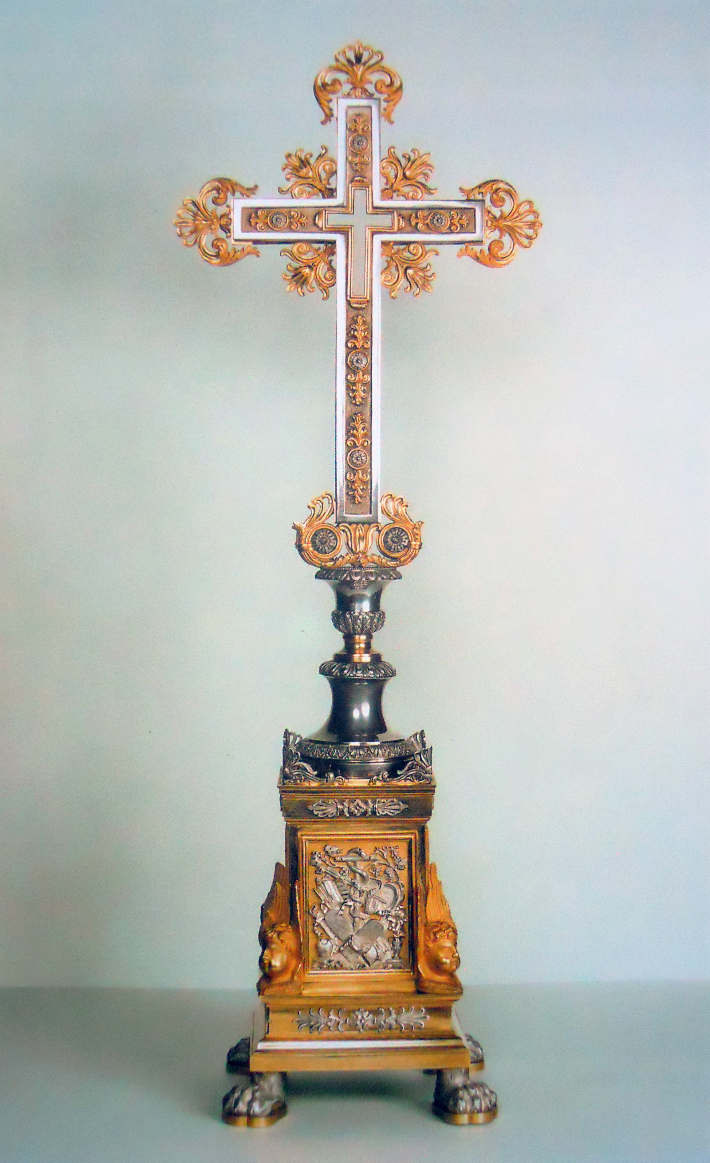 Croce del vescovo Zane (Tesoro delle Sante Croci, Brescia)